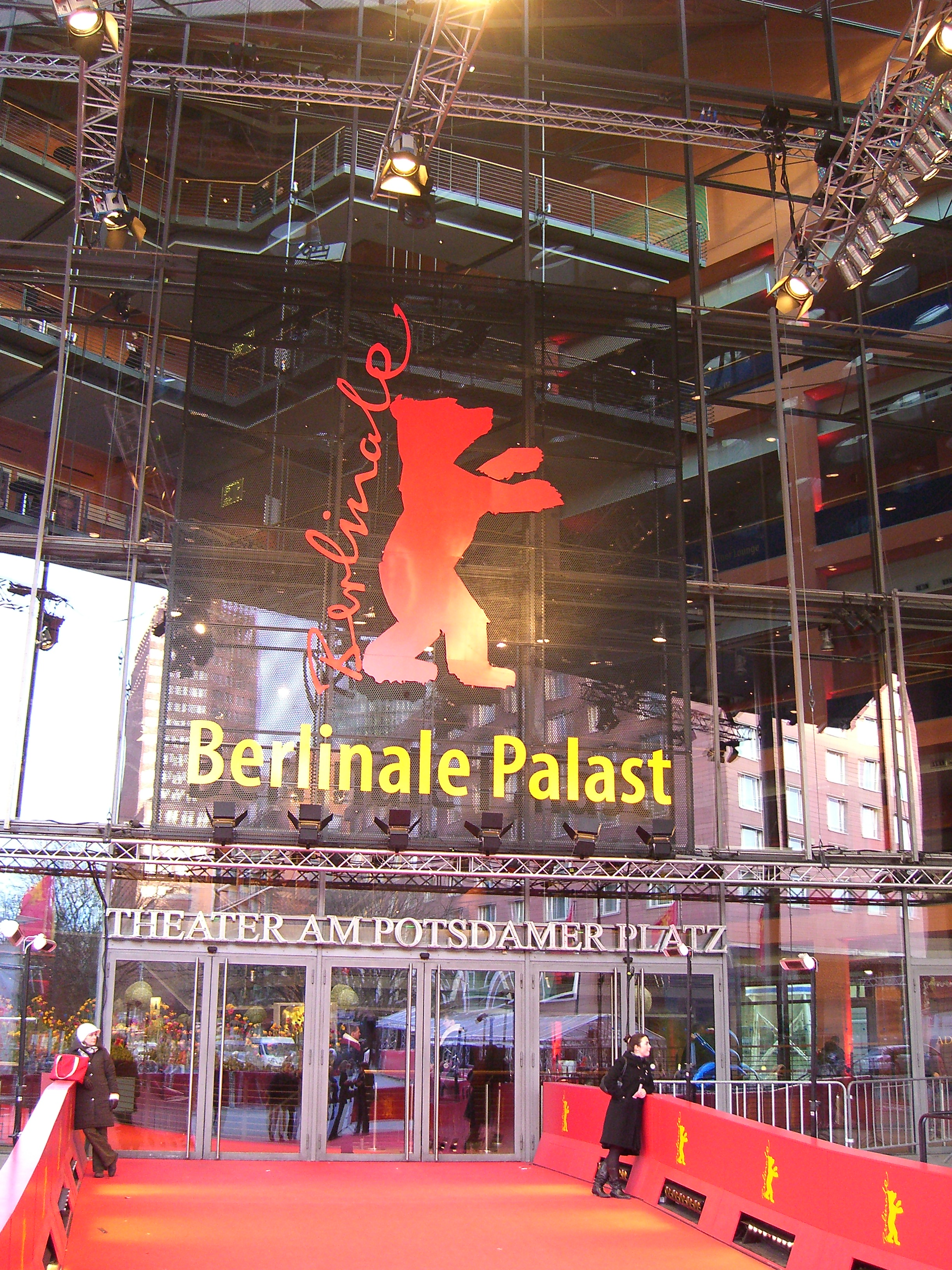 Eingangsbereich des Berlinale Palastes 2008.